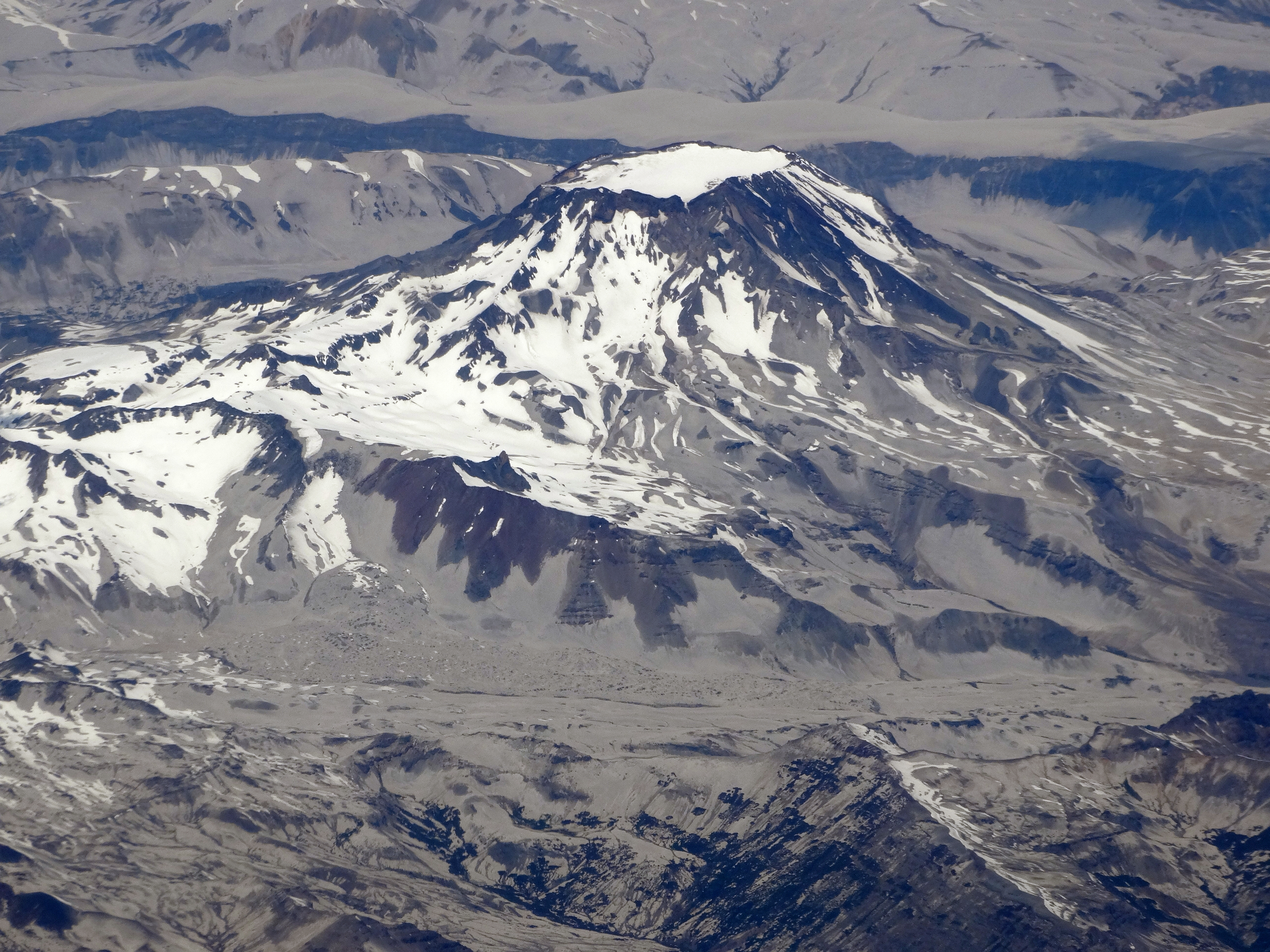 Vista aérea del Volcán Descabezado Grande, VII Región, Chile